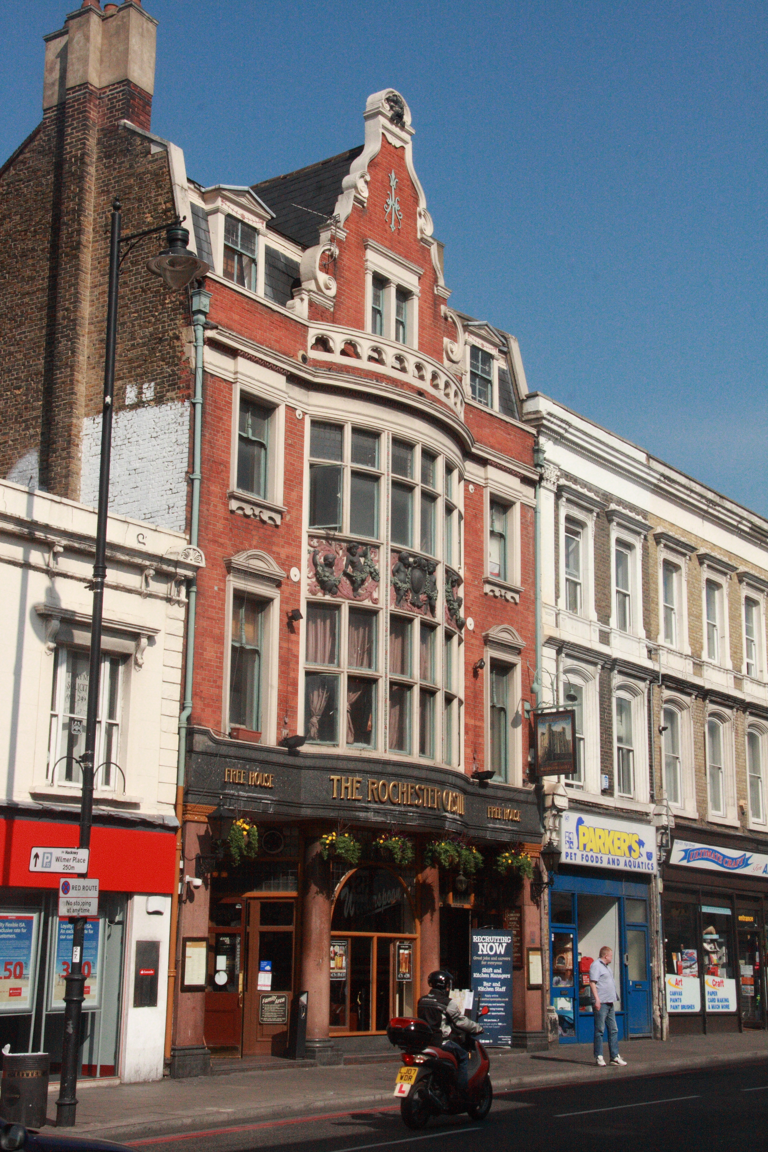 Rochester Castle